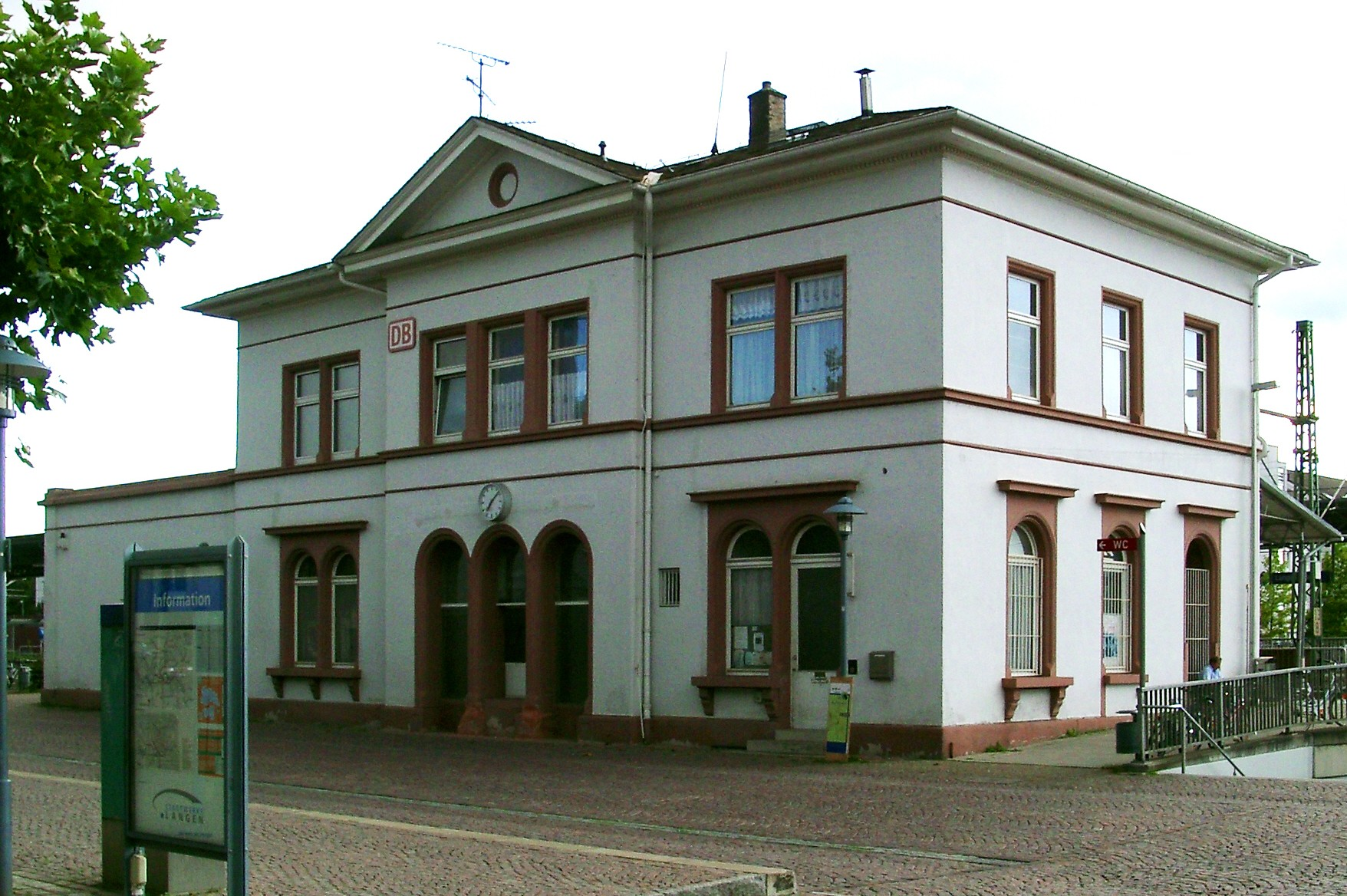 Langen, Hessen, Bahnhof